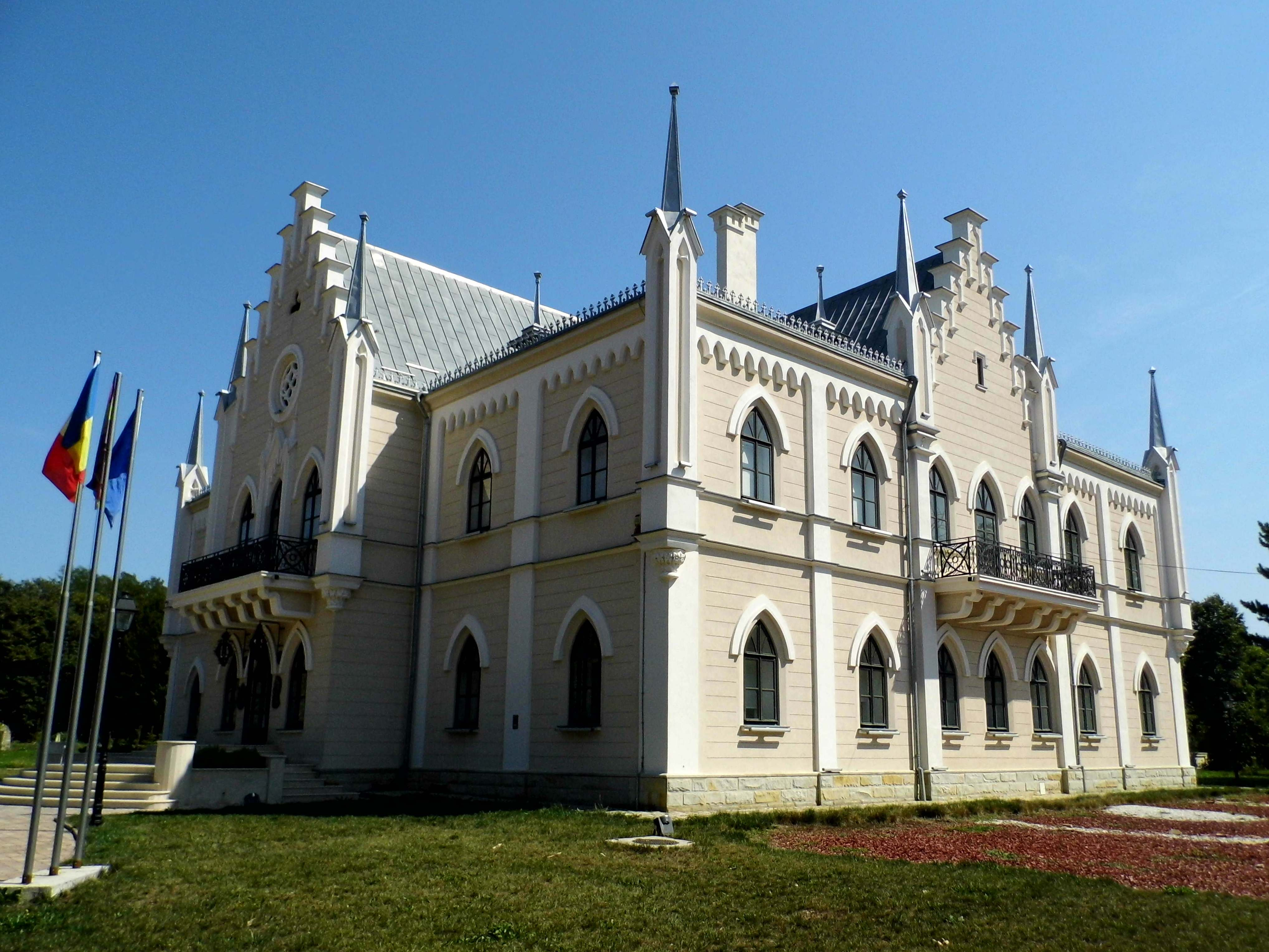 Palatul de reședință de la Ruginoasa Foto 2015